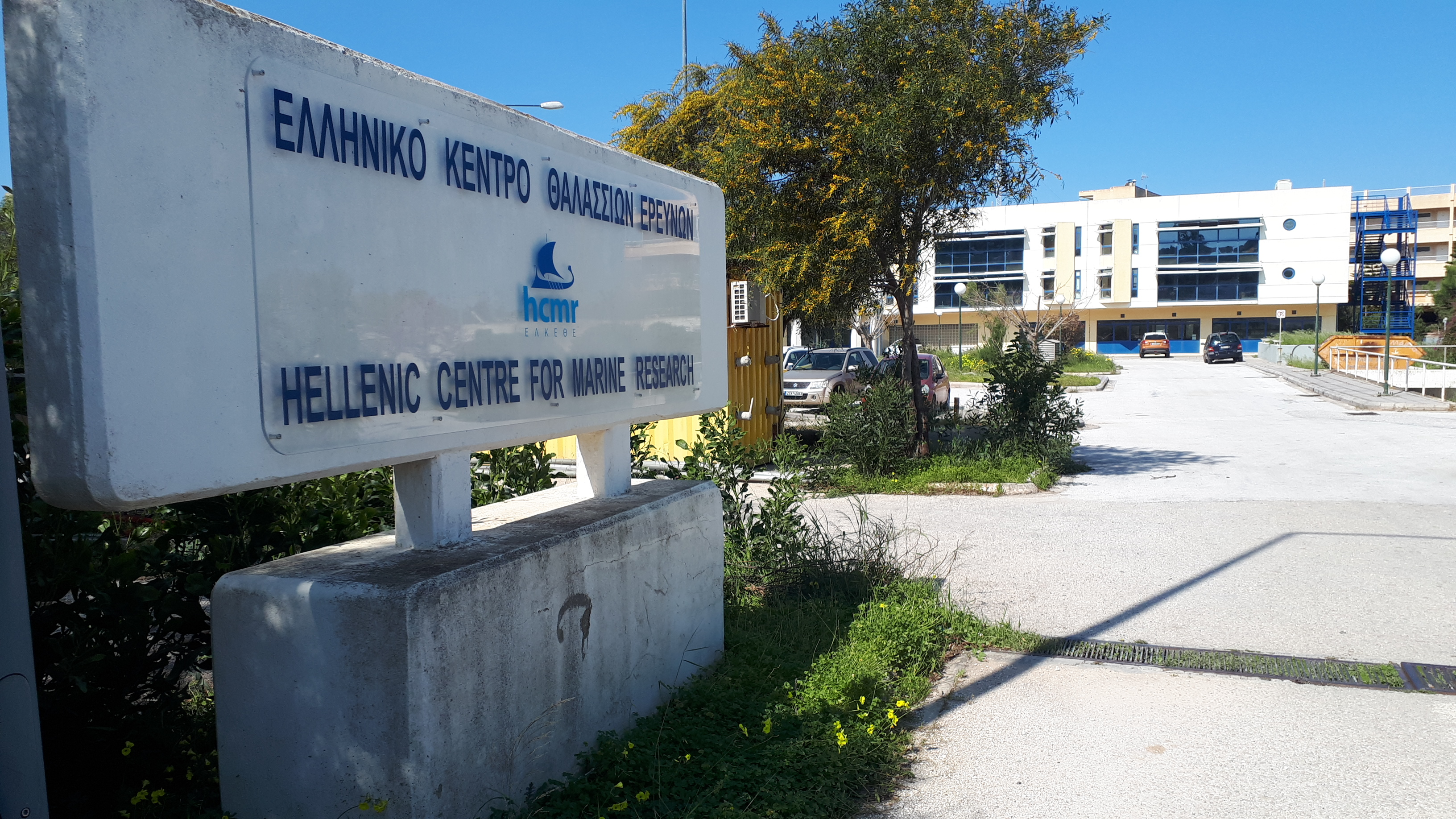 Το κεντρικό κτίριο του Ελληνικού Κέντρου Θαλασσίων Ερευνών βρίσκεται στην Ανάβυσσο της νοτιοανατολικής Αττικής